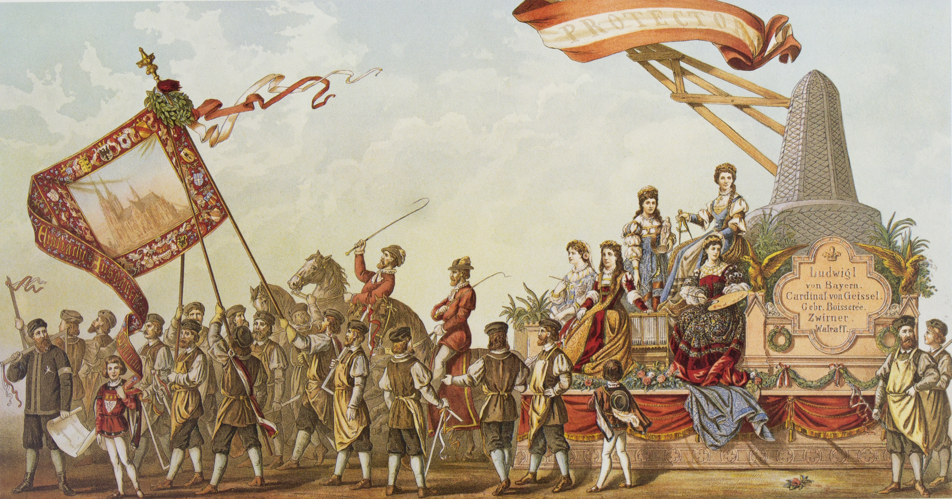 Tony Avenarius: Historischer Festzug veranstaltet bei der Feier der Vollendung des Kölner Doms am 18. October 1880. Tafel XXVII